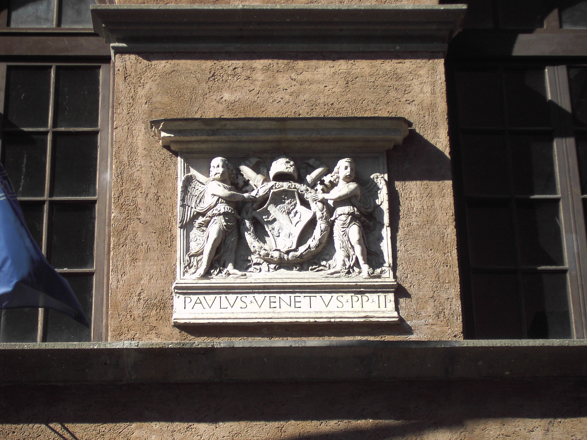 Roma, Palazzo Venezia: memoria e stemma di Paolo II Barbo